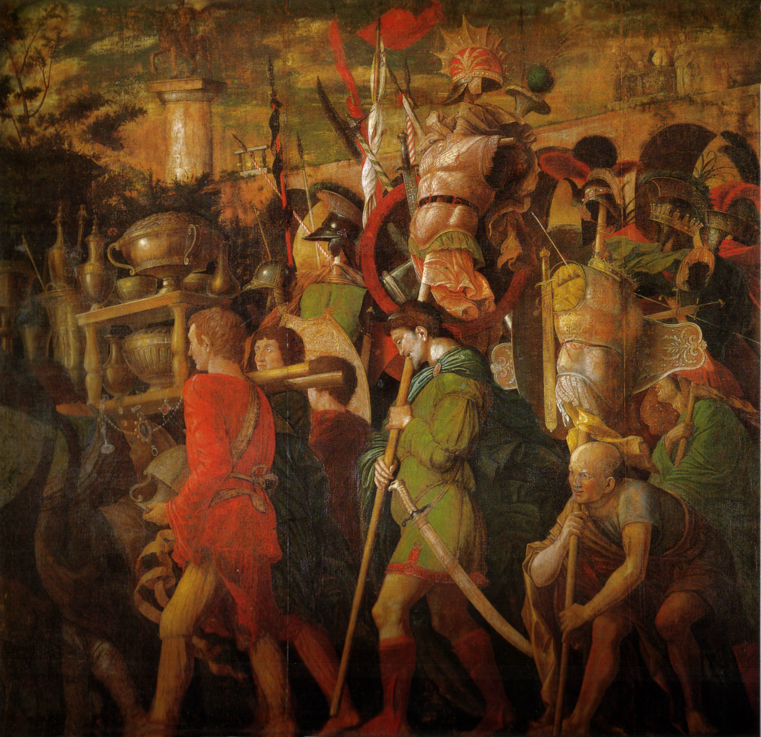 detail